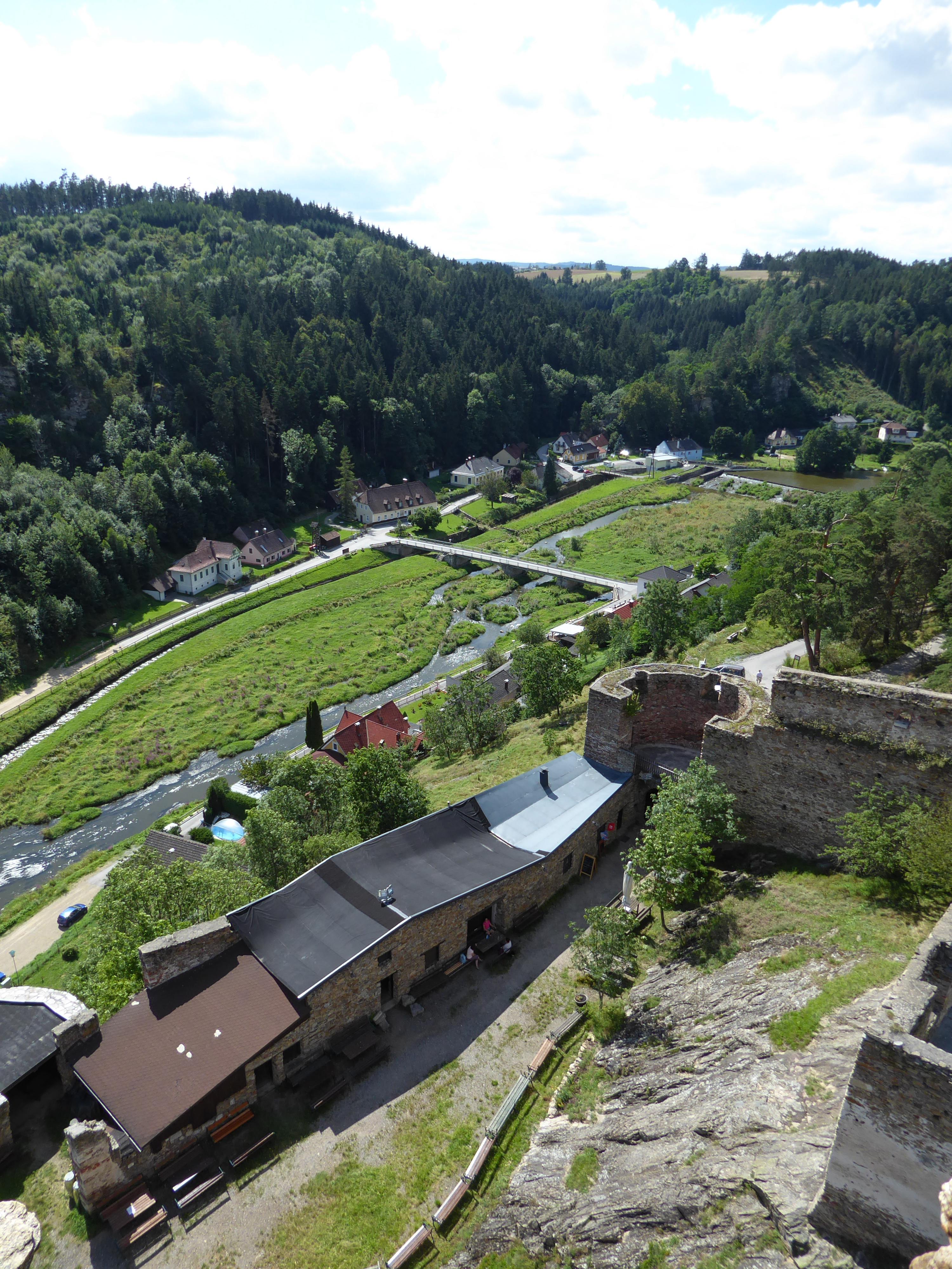 Burgruine Kollmitz, Kollmitzdörfl, Raabs an der Thaya, Niederösterreich - Blick vom Bergfried nach Südwesten (Zugang)